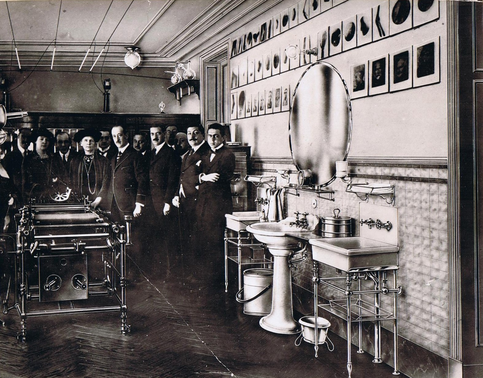 Visita de Madame Curie al instituto radiológico del Dr. Celedonio Calatayud